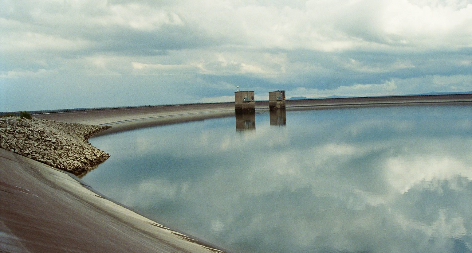 View to Oberbecken Markersbach.